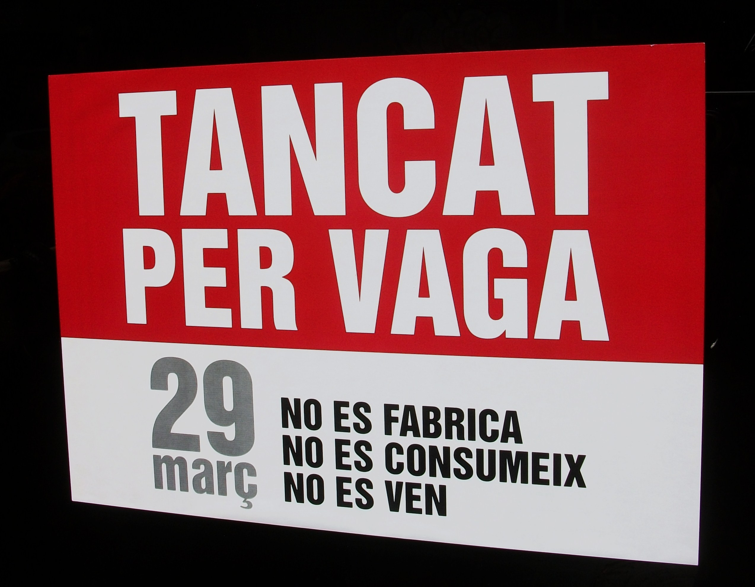 Tancat per vaga - 29 de març - No es fabrica, no es consumeix, no es ven (València).